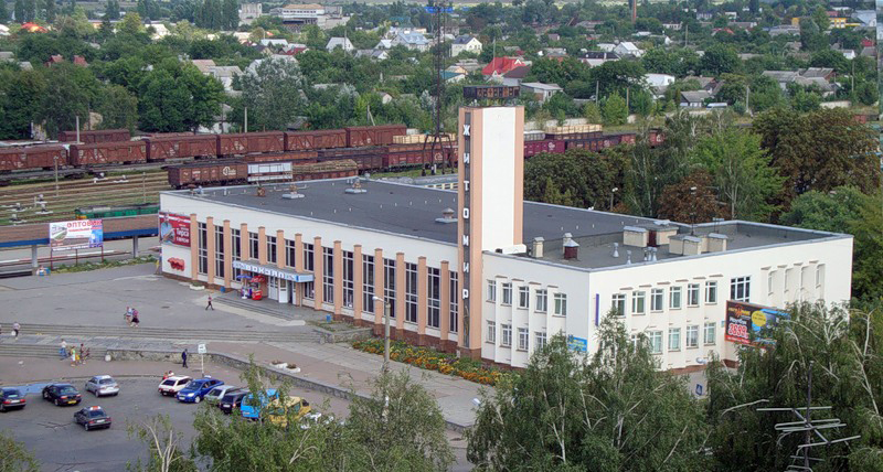 Залізничний вокзал